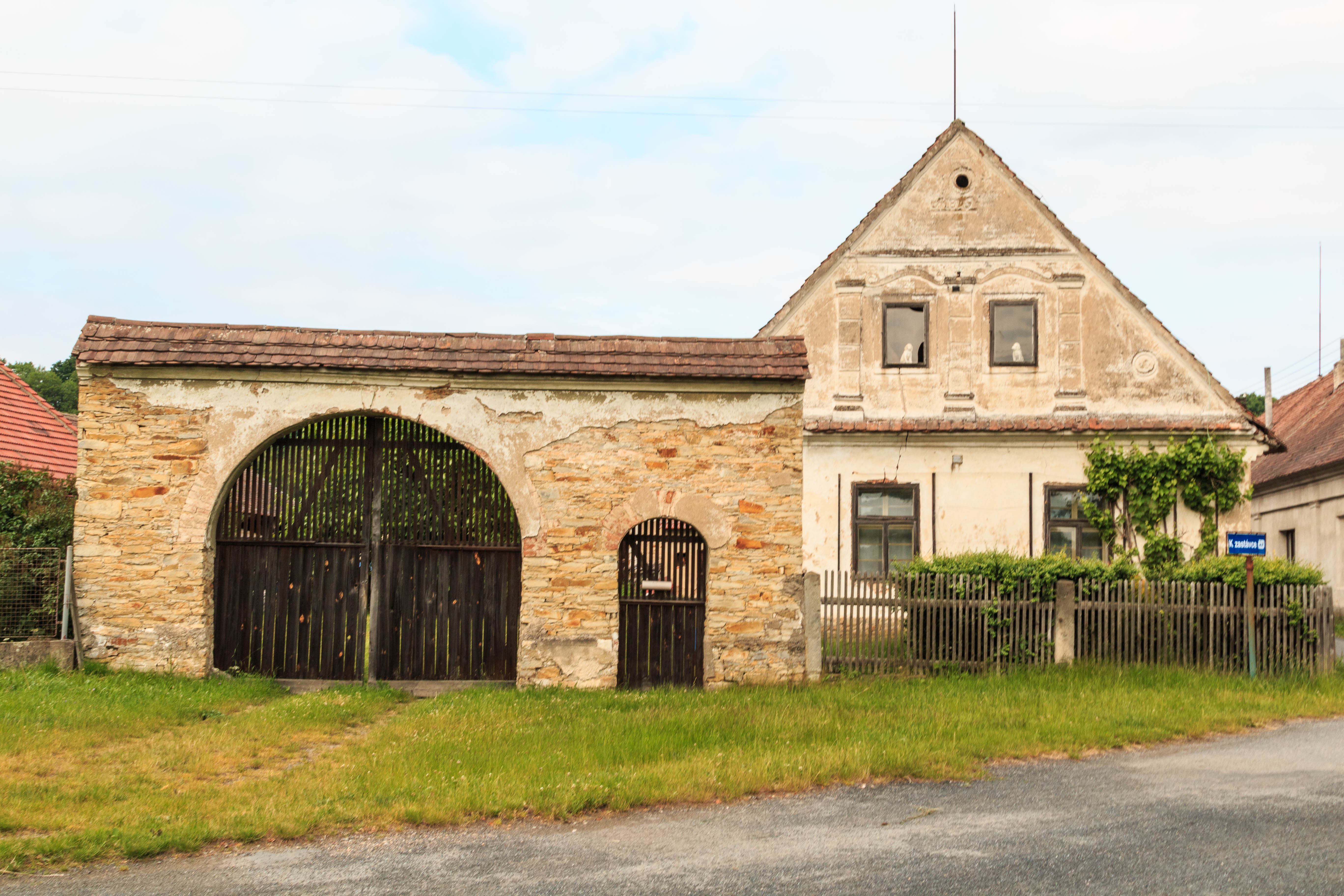 Petrovice čp. 23